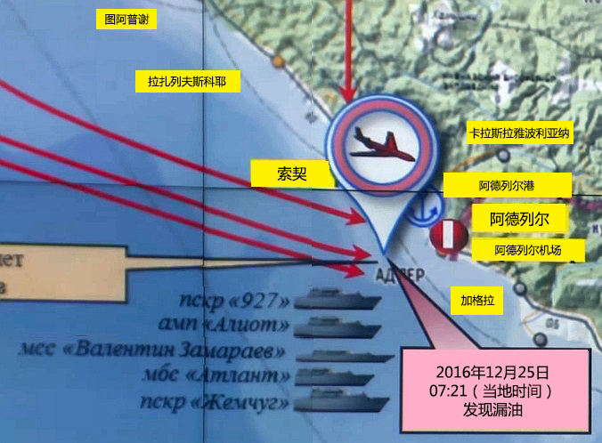 2016年俄罗斯国防部图-154飞机空难，俄罗斯国防部绘制的飞行轨迹示意图。